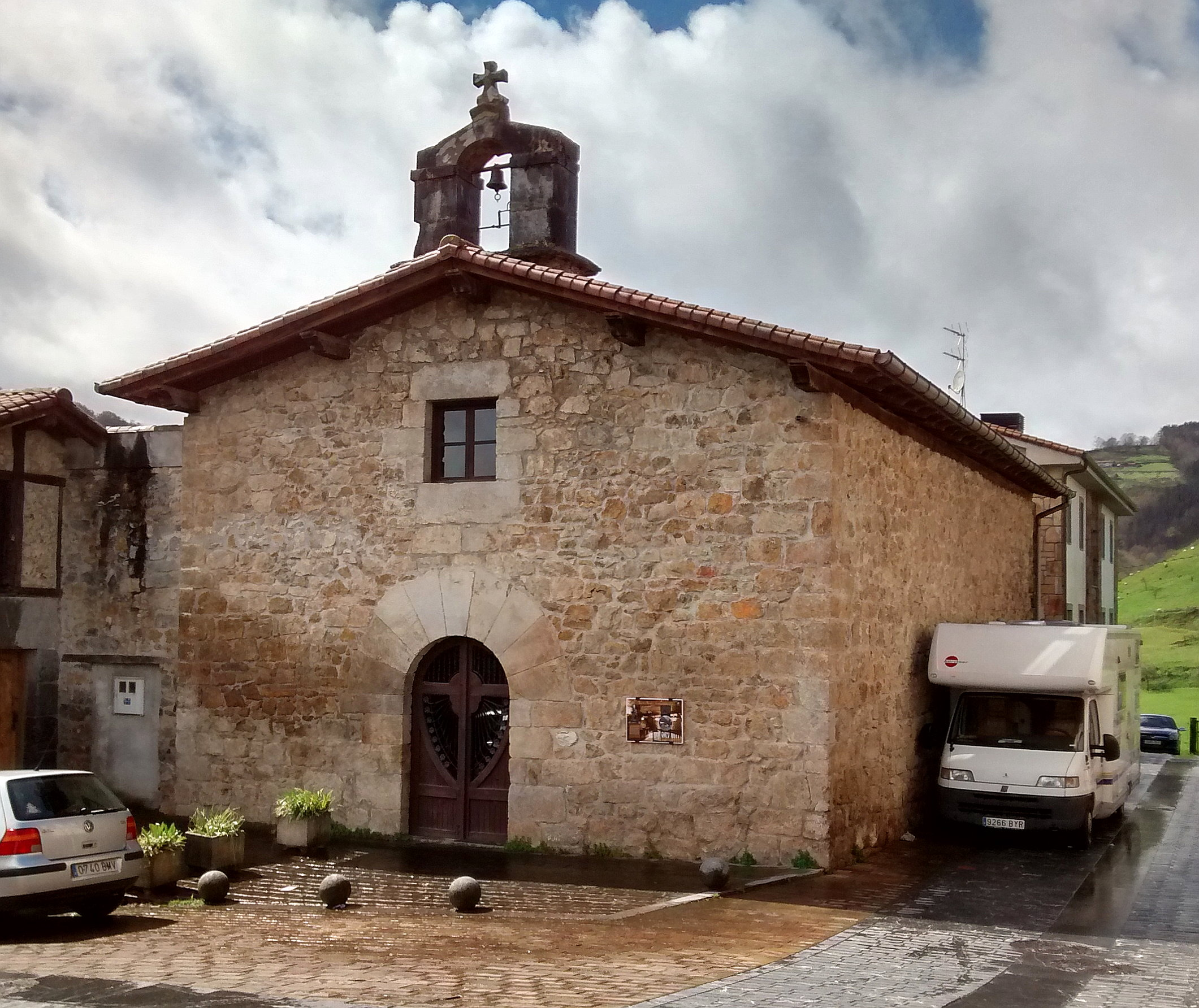 Elizmendiko Santa Gurutze ermita - Asteasu